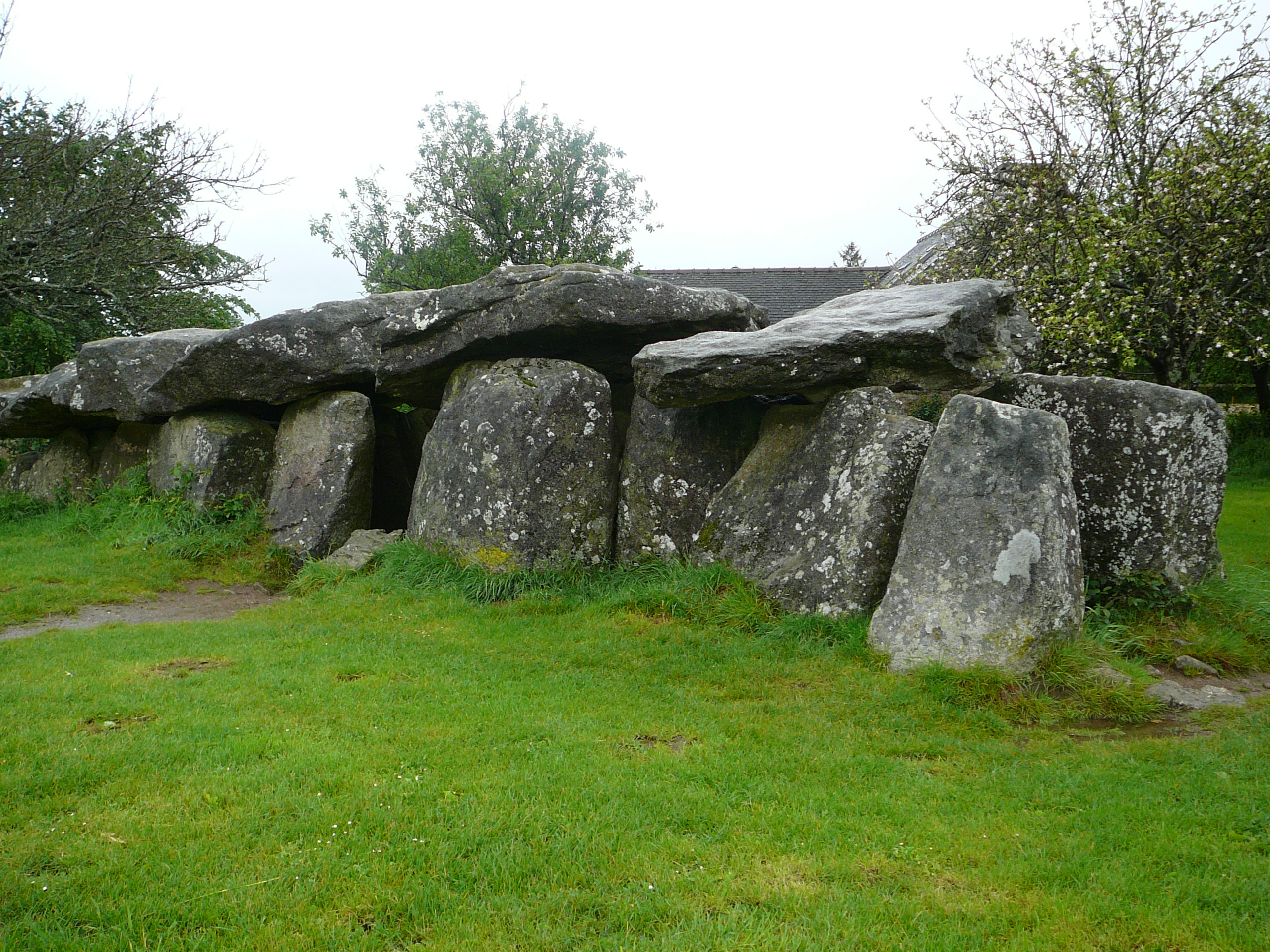 Commana : l'allée couverte de Mougau Bihan